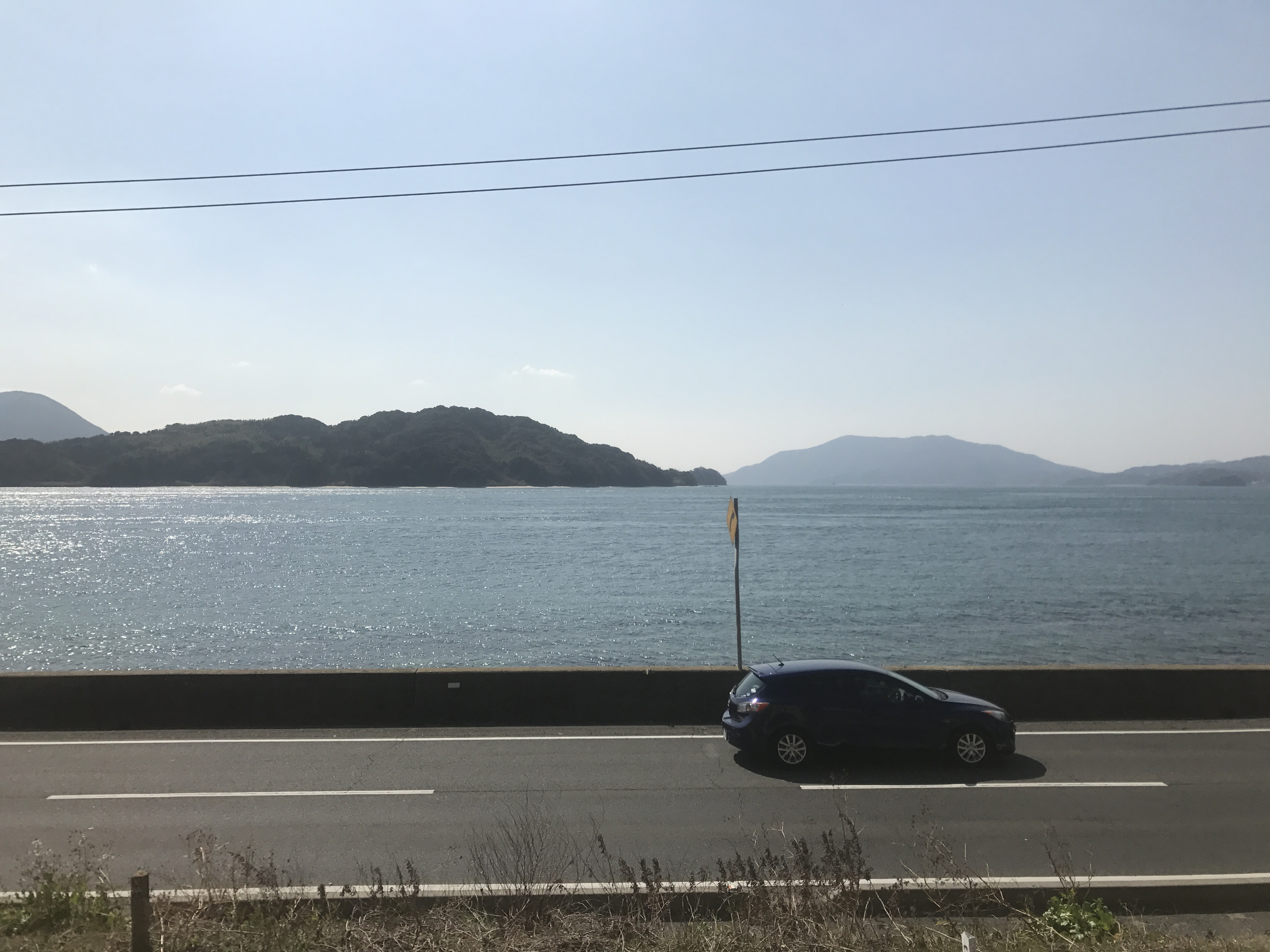 山陽本線列車内より望む笠佐島と室津半島